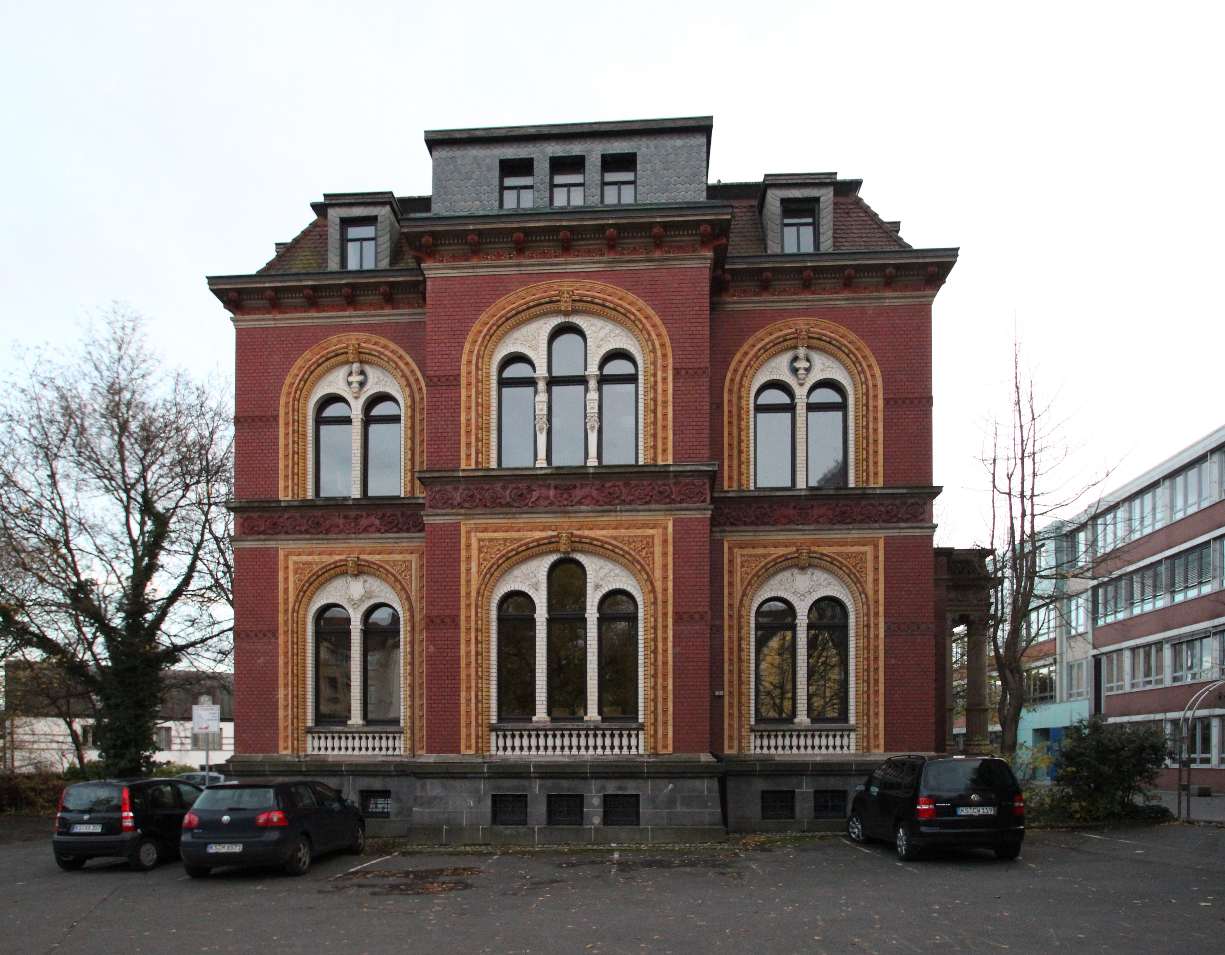 Villa des Baustoffhändlers Scheldt Akazienweg 7 in Kassel